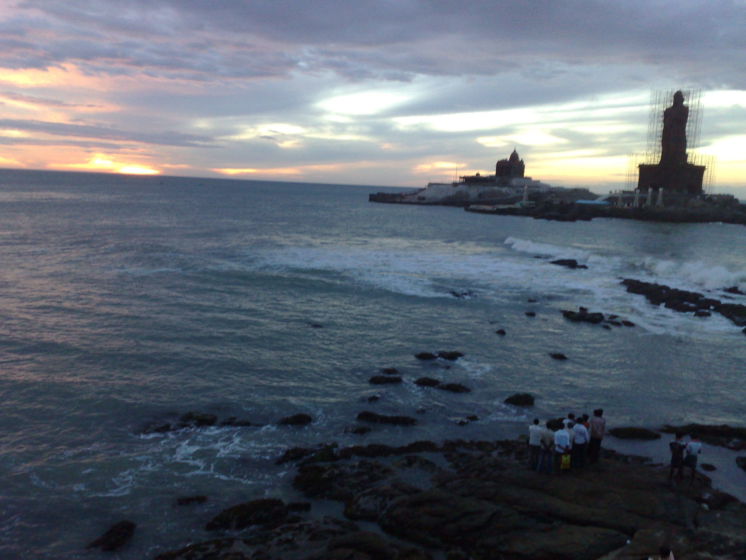 ബംഗാൾ ഉൾക്കടലിൽ നിന്നും സൂര്യൻ ഉദിച്ചു വരുന്നതും, അറബിക്കടലിൽ അസ്തമിക്കുന്നതും ഒരേസ്ഥലത്തുനിന്നും നമുക്കു കാണാൻ കഴിയുന്ന ഇടമാണ് കന്യാകുമാരി.. അവിടെ നിന്നുള്ള സൂര്യോദയത്തിൻറെ ചിത്രം.